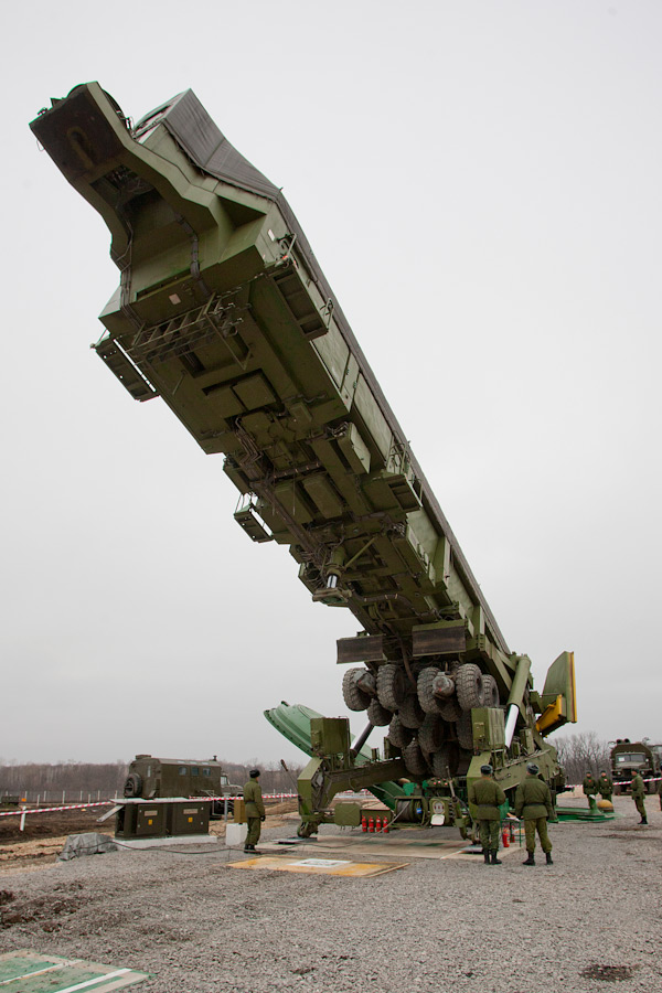 Транспортировка и загрузка в шахту межконтинентальной баллистической ракеты ракетного комплекса 5-го поколения РТ-2ПМ2 «Тополь-М»